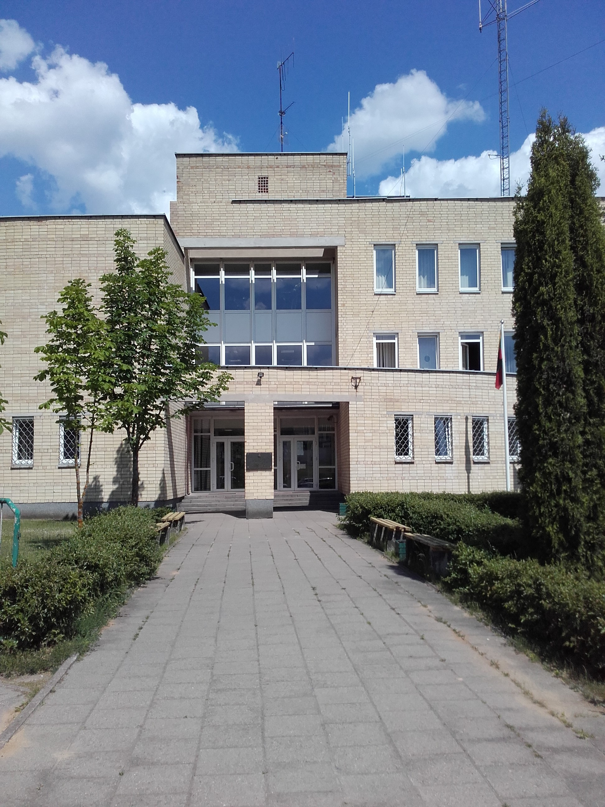 Rinktinės „Vytis“ buveinė